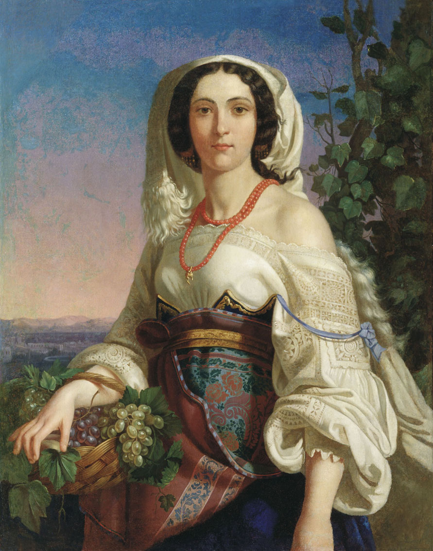 Неаполитанка. Холст, масло. 99 x 77 см. Херсонкий областной художественный музей им. А.А.Шовкуненко